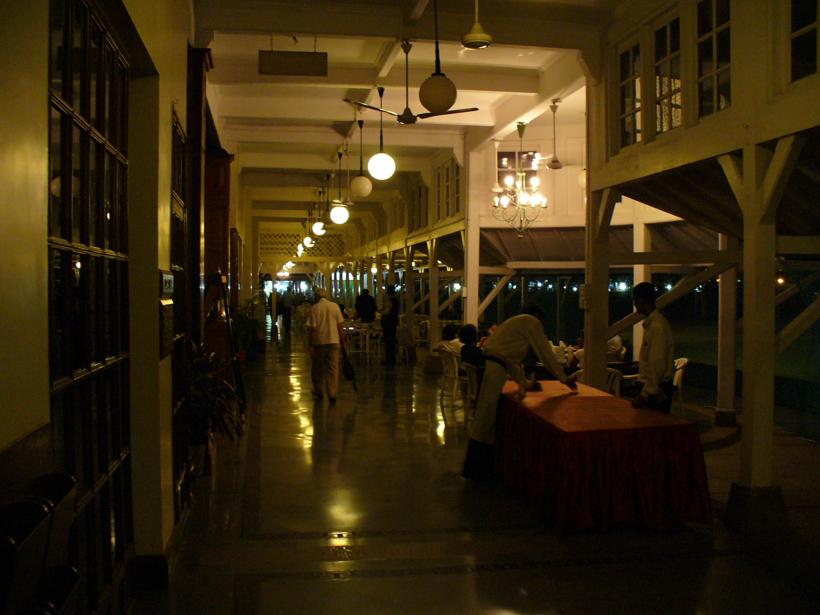 Bombay Gymkhana main corridor